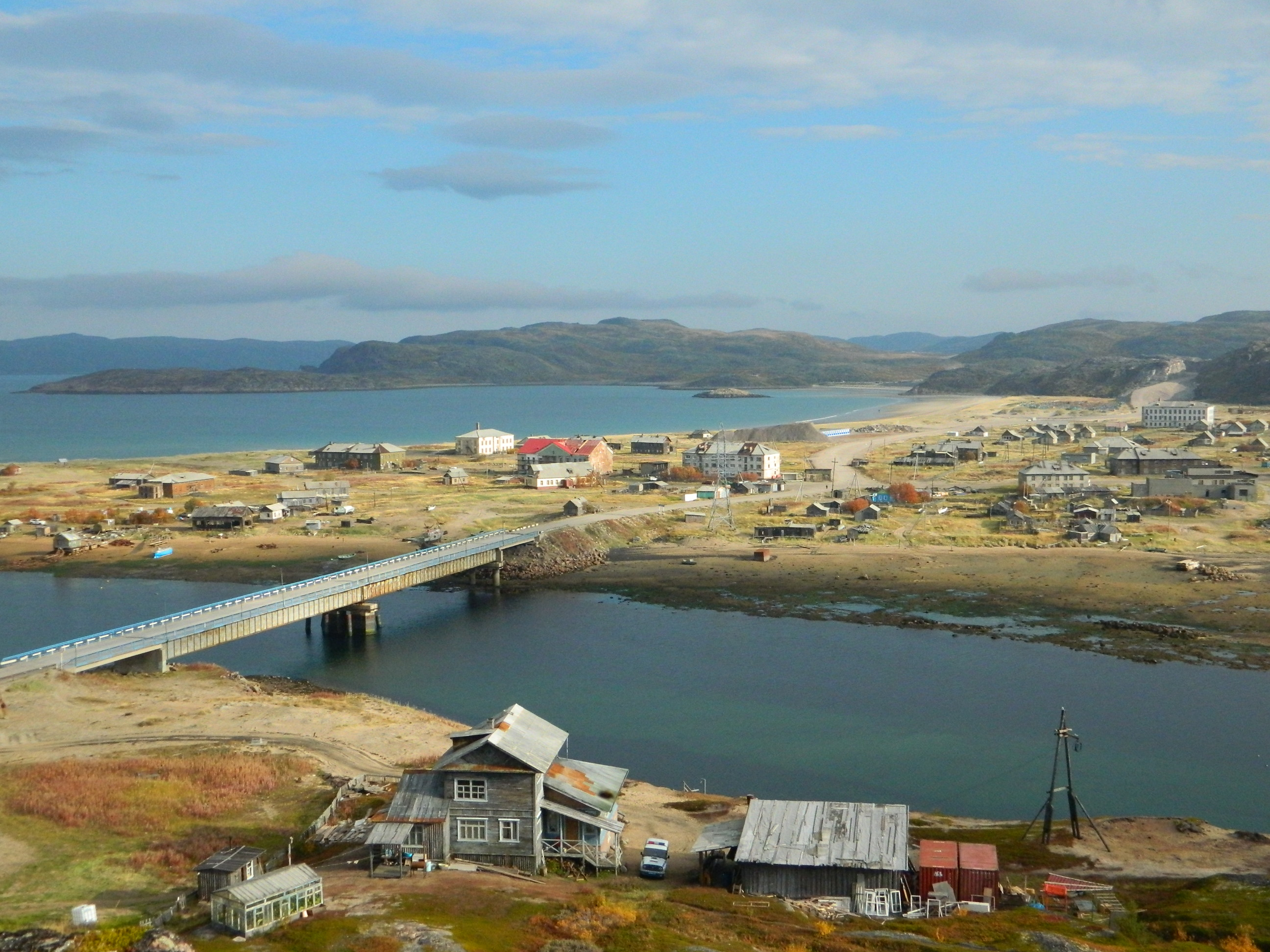 Панорамное фото Териберки. На переднем плане декорации к фильму «Левиафан»